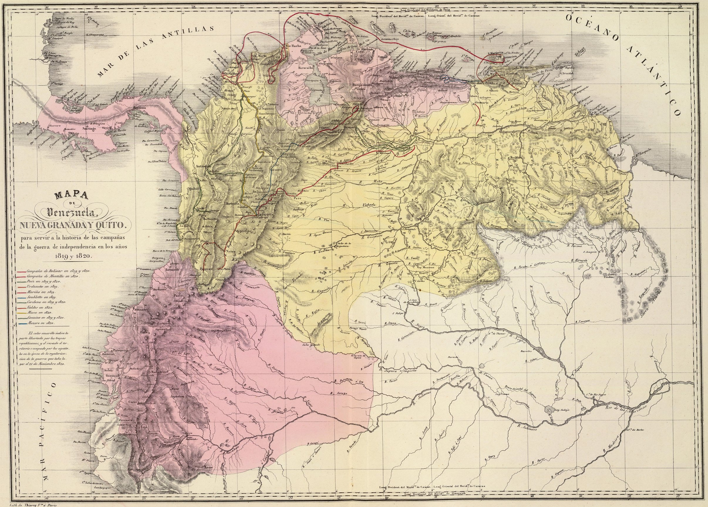 Mapa de Venezuela, Nueva Granada y Quito, que muestras las campañas de la guerra de independencia entre 1819 y 1820. Tomado del "Atlas físico y político de la República de Venezuela", 1840.